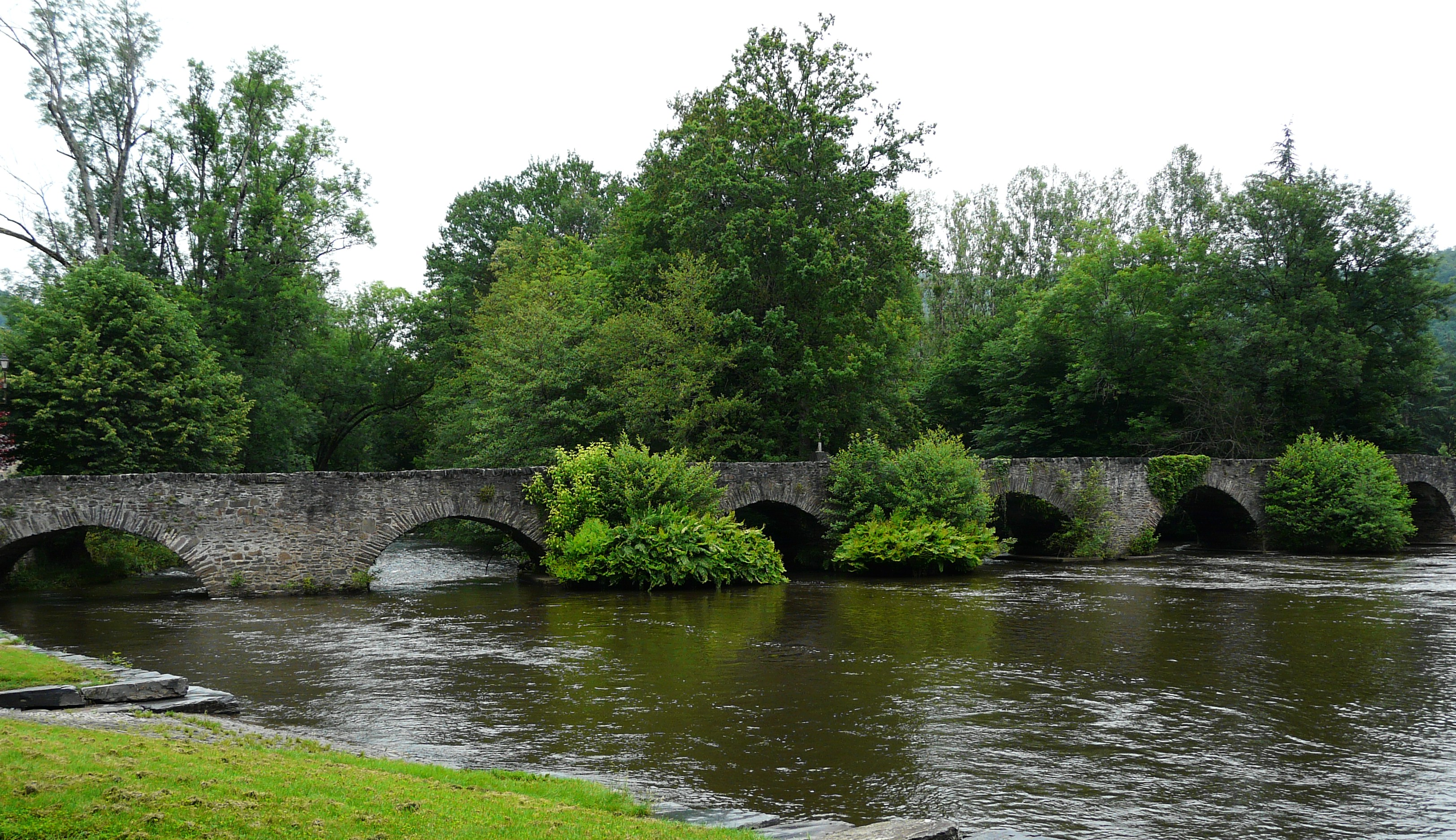 Le vieux pont du Saillant sur la Vézère, entre Voutezac (au premier plan) et Allassac (sur l'autre rive), Corrèze, France. Object location45° 16′ 34″ N, 1° 27′ 27″ E